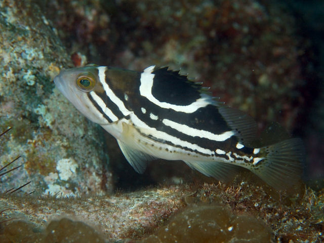 イヤゴハタyg Epinephelus poecilonotus